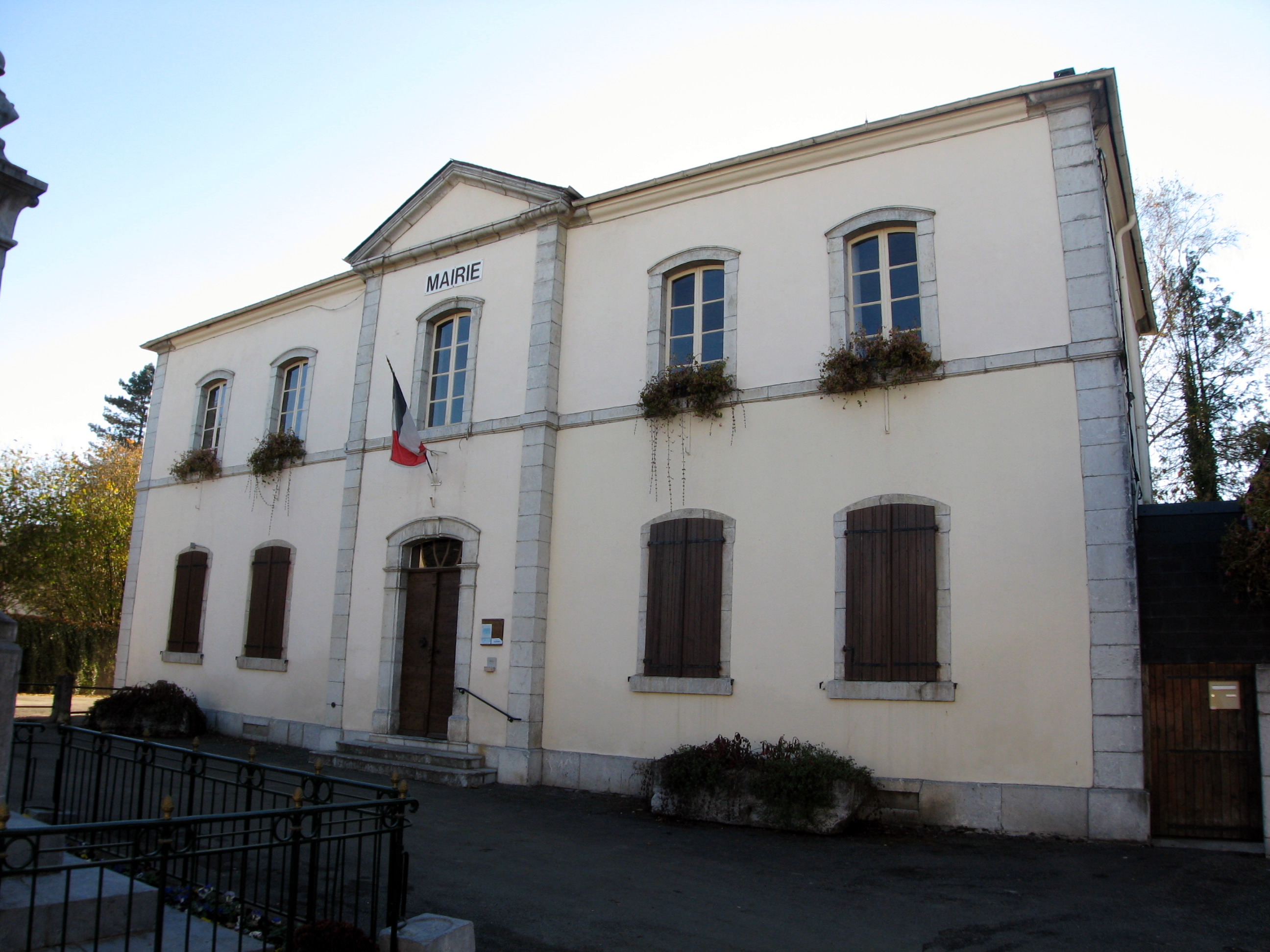 Mairie d'Ogeu-les-Bains (Pyrénées-Atlantiques) (Pyrénées).